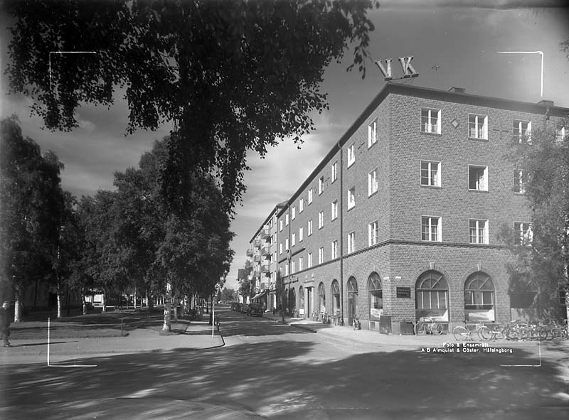 Miljöer; Stadsmiljö